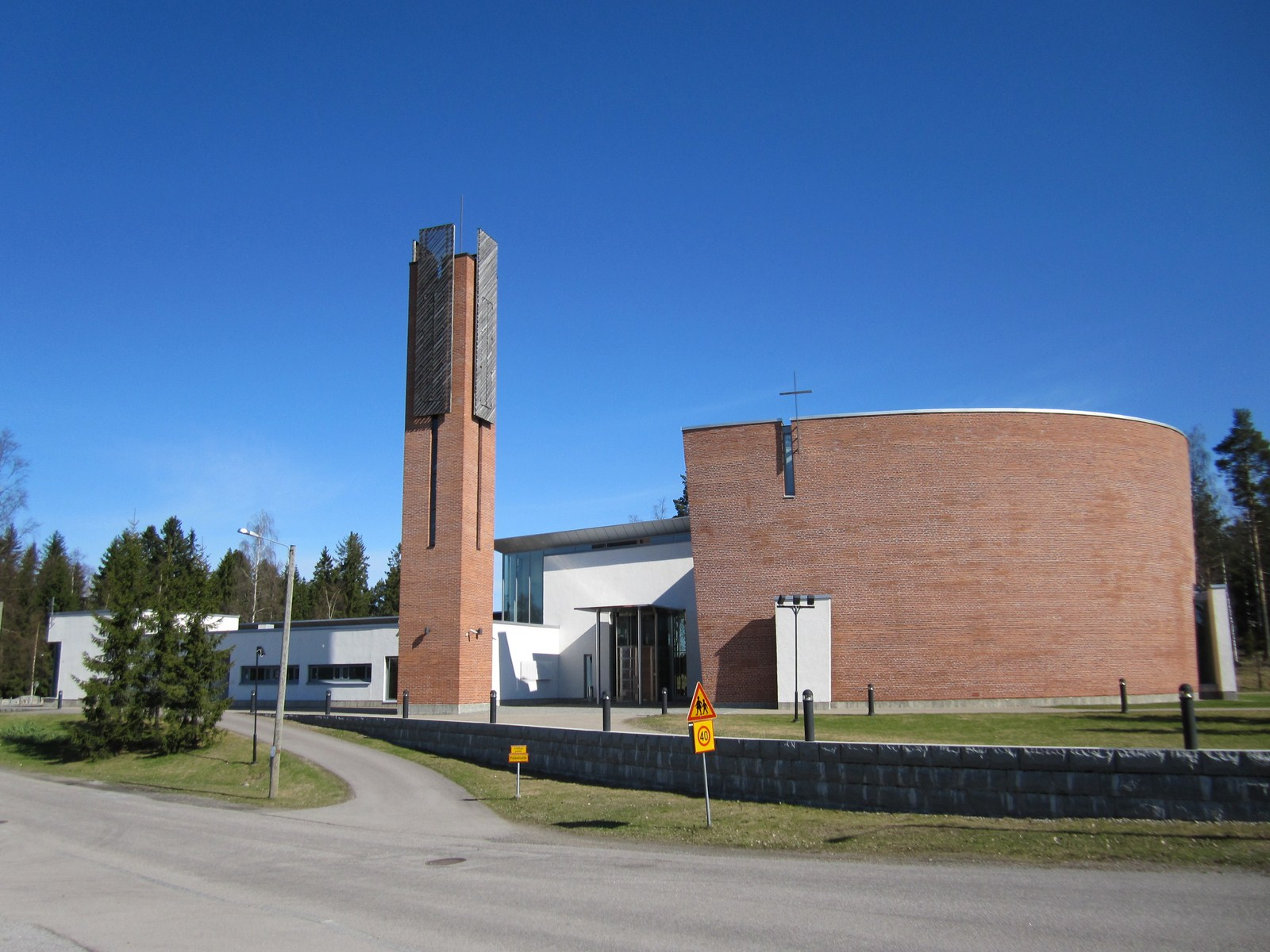 Aitolahden kirkko, kevät 2010. Aitolahdentieltä kuvattuna.